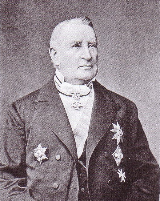 Porträtfotografie von Karl Gustav von Goßler (1810-1885)